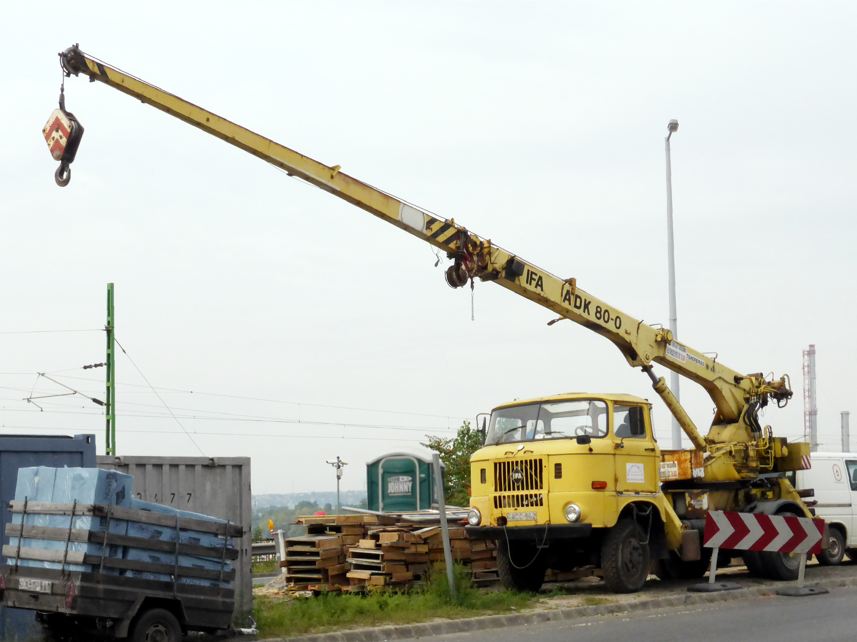 Ein Autodrehkran 80 (ADK 80-0) auf dem Fahrgstell des IFA W50 in Budapest.